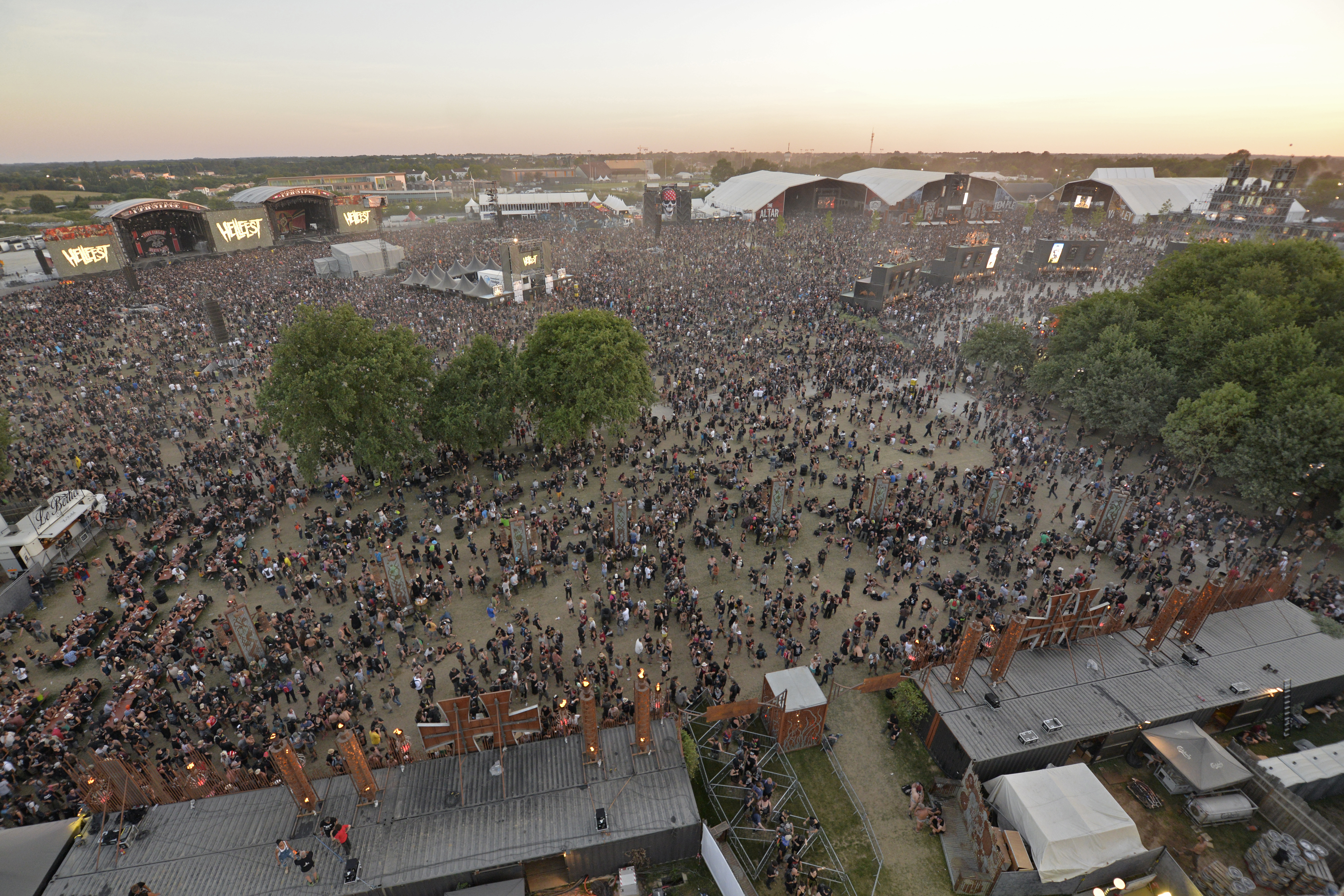 Vue du Hellfest 2017 depuis la grande roue.